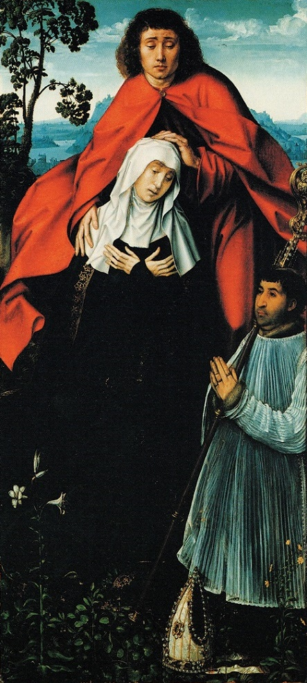 Tabla central del retablo de Nuestra Señora de la Compasión del trascoro de la Catedral de Palencia con el obispo Juan Rodríguez de Fonseca como donante, 1505